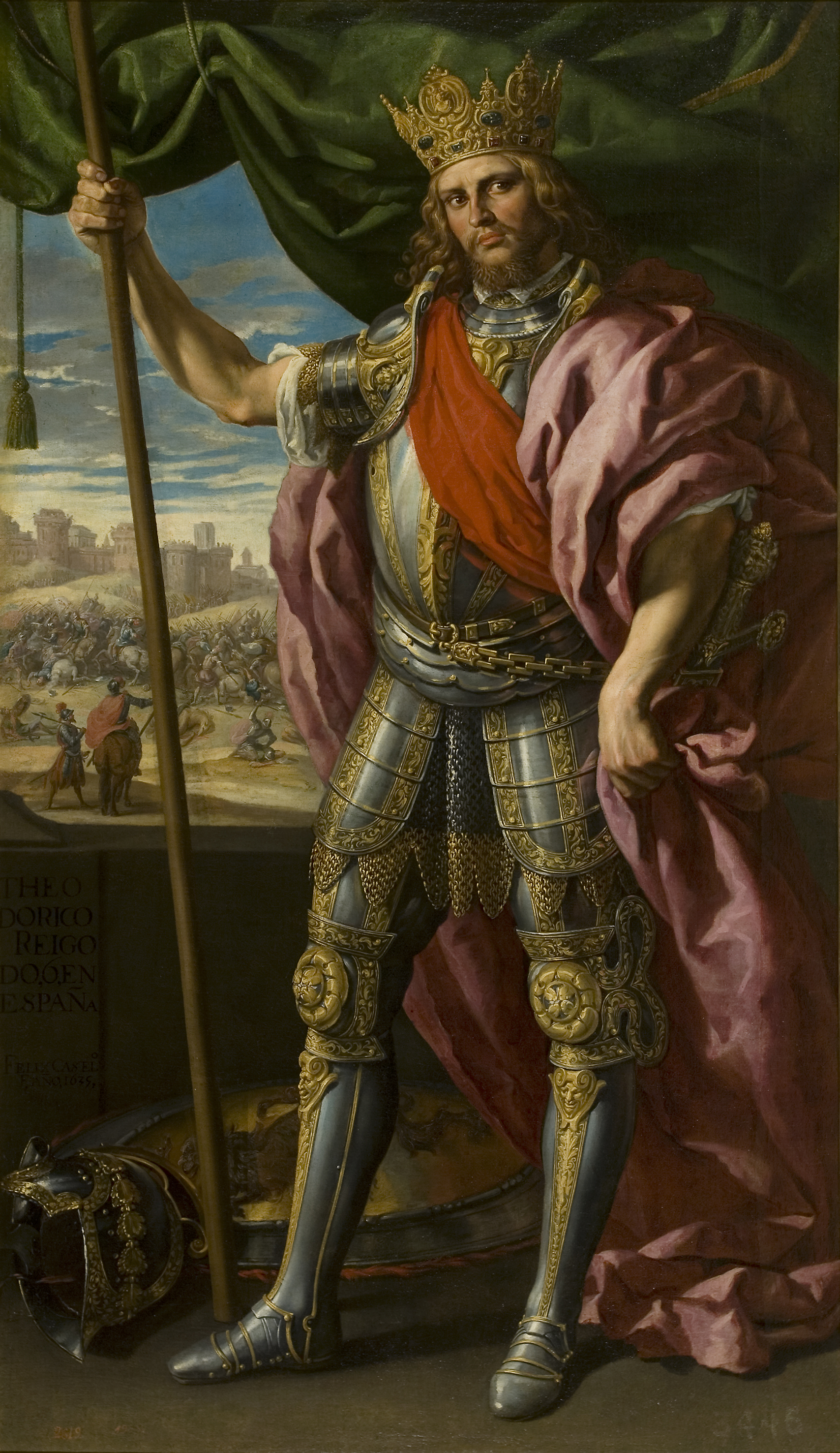 Retrato imaginario de Teodorico I († 451), rey de los Visigodos e hijo ilegítimo del rey Alarico I.